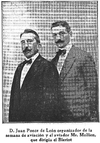 Juan Ponce de León Pte del comite de aviacion de Malaga